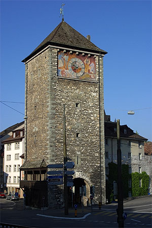 Schwabentor in Schaffhausen (Nr. 03.1-5216)